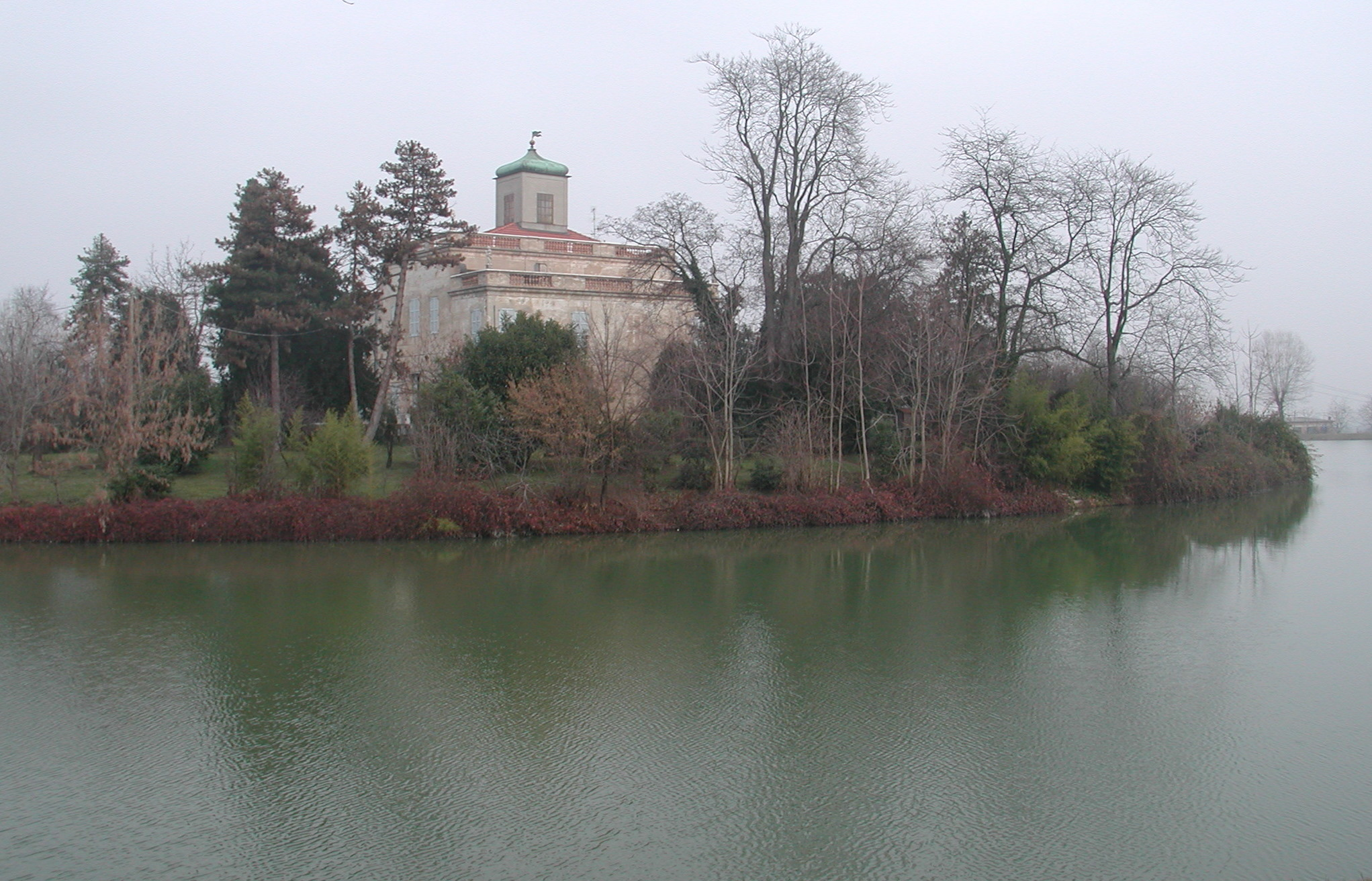 Villa d'Este, Rivalta, Reggio Emilia